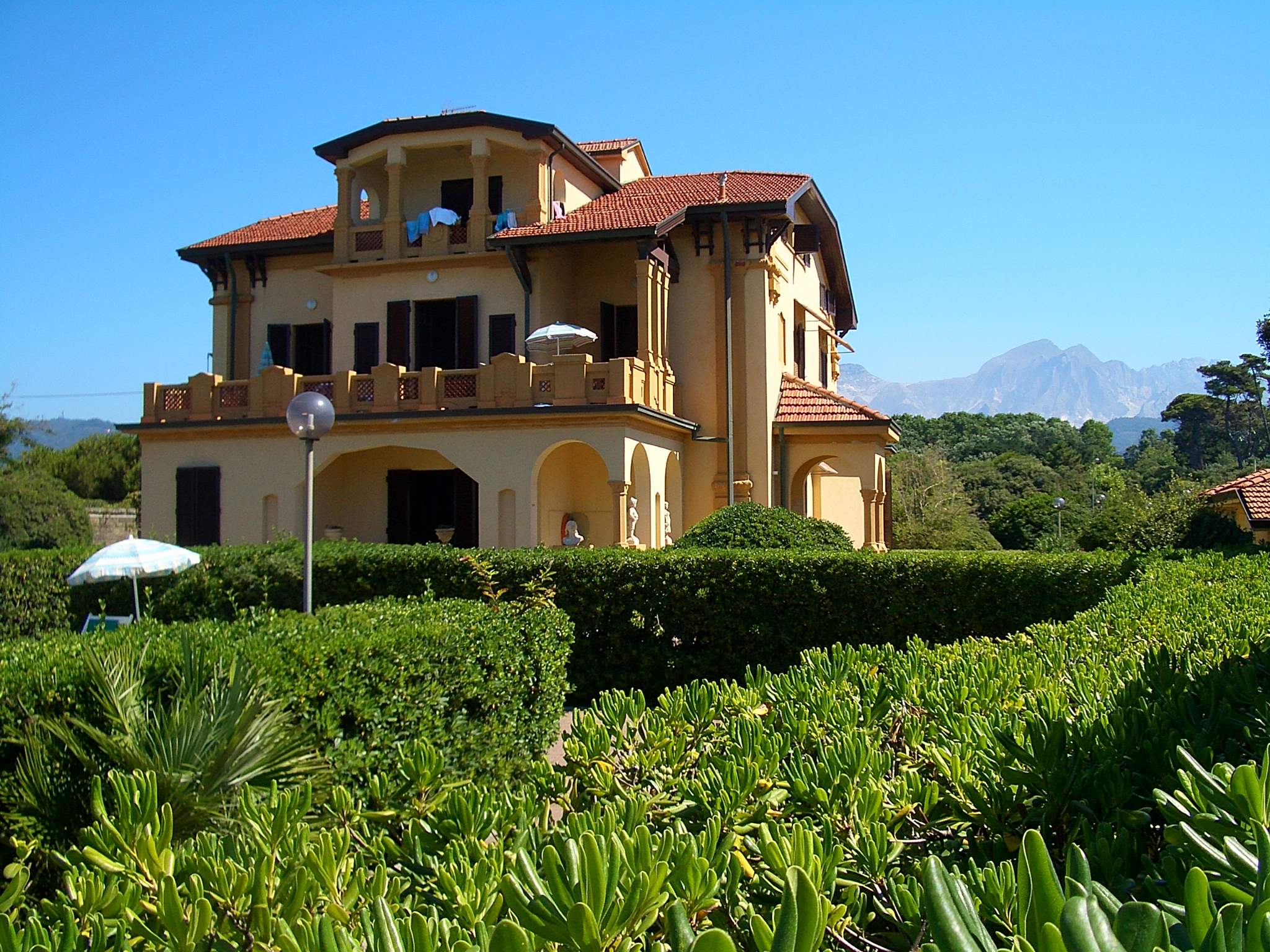 A villa in Marina di Carrara, now the main building of the local HI hostel